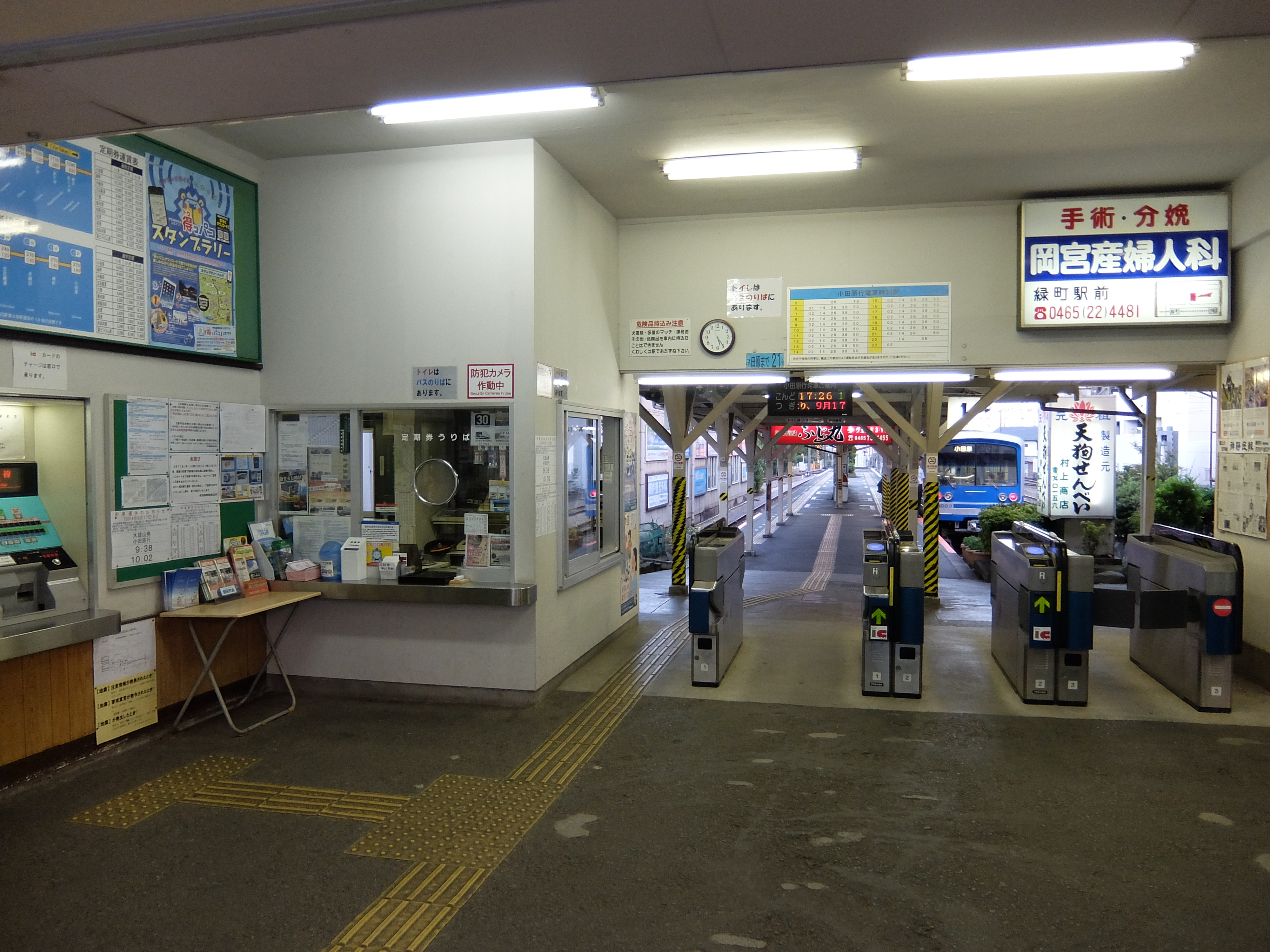 伊豆箱根鉄道 大雄山駅 改札付近